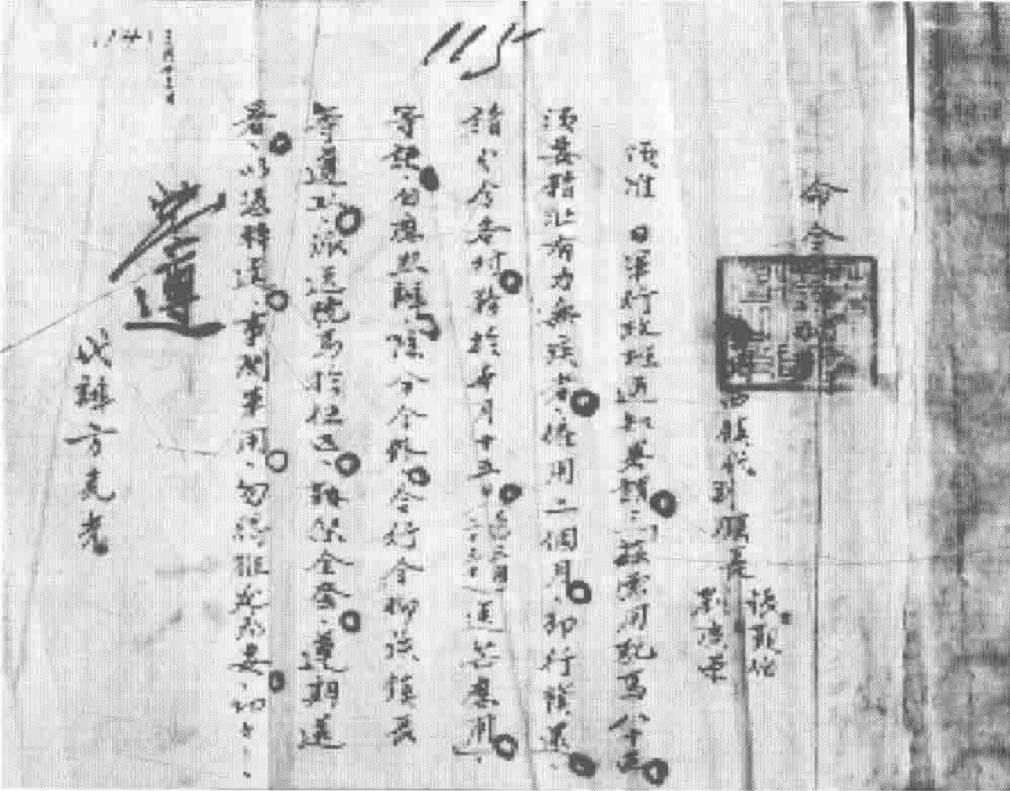 中文（中国大陆）: 芒市宣抚司代日军雇佣马匹的命令